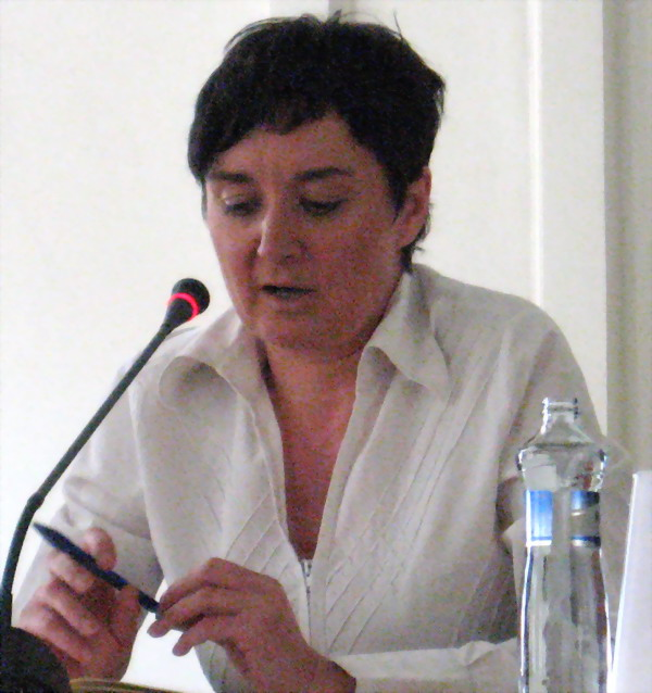 Jana Hybášková